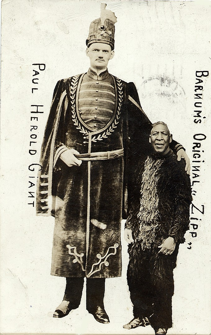 Riese Paul Herold (2,36 m) und sein Kollege Zip the Pinhead beim Zirkus Barnum